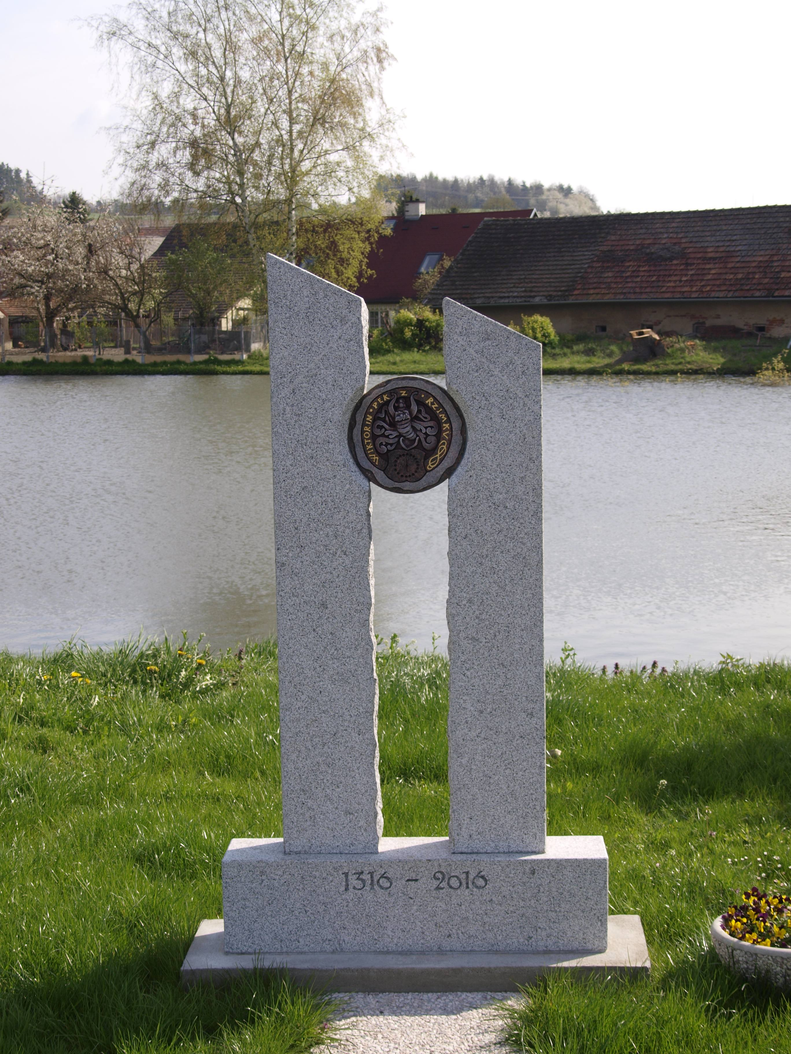 Koryta, část obce Bezděkov, okres Klatovy, pomníček Viktorina Peka z Římku Project: Fotíme Česko.